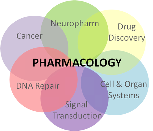 药理学由什么组成